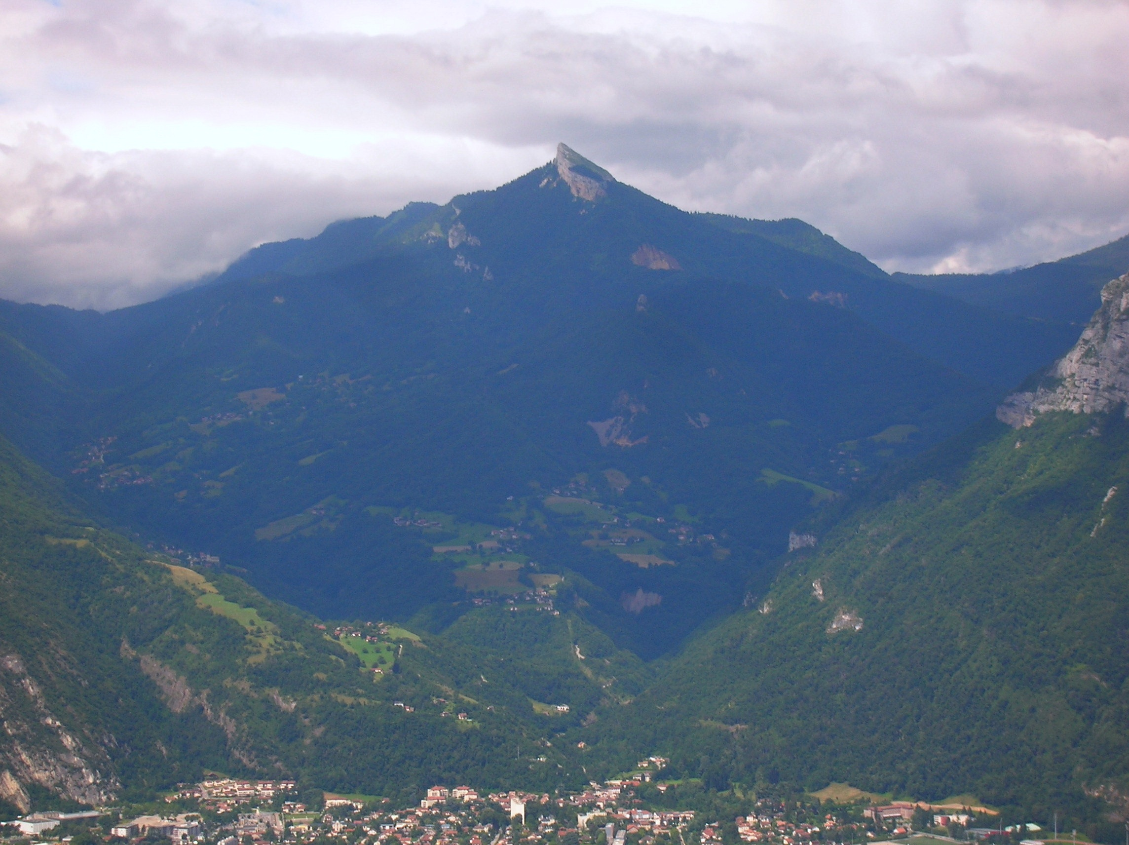 Quaix-en-Chartreuse vue depuis le chemin pour la Ferme Durant, à La Poye (Fontaine (Isère)). Au fond, la Pinéa.